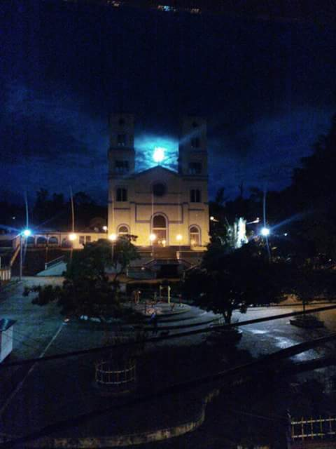 Parque e Iglesia Junin de Noche